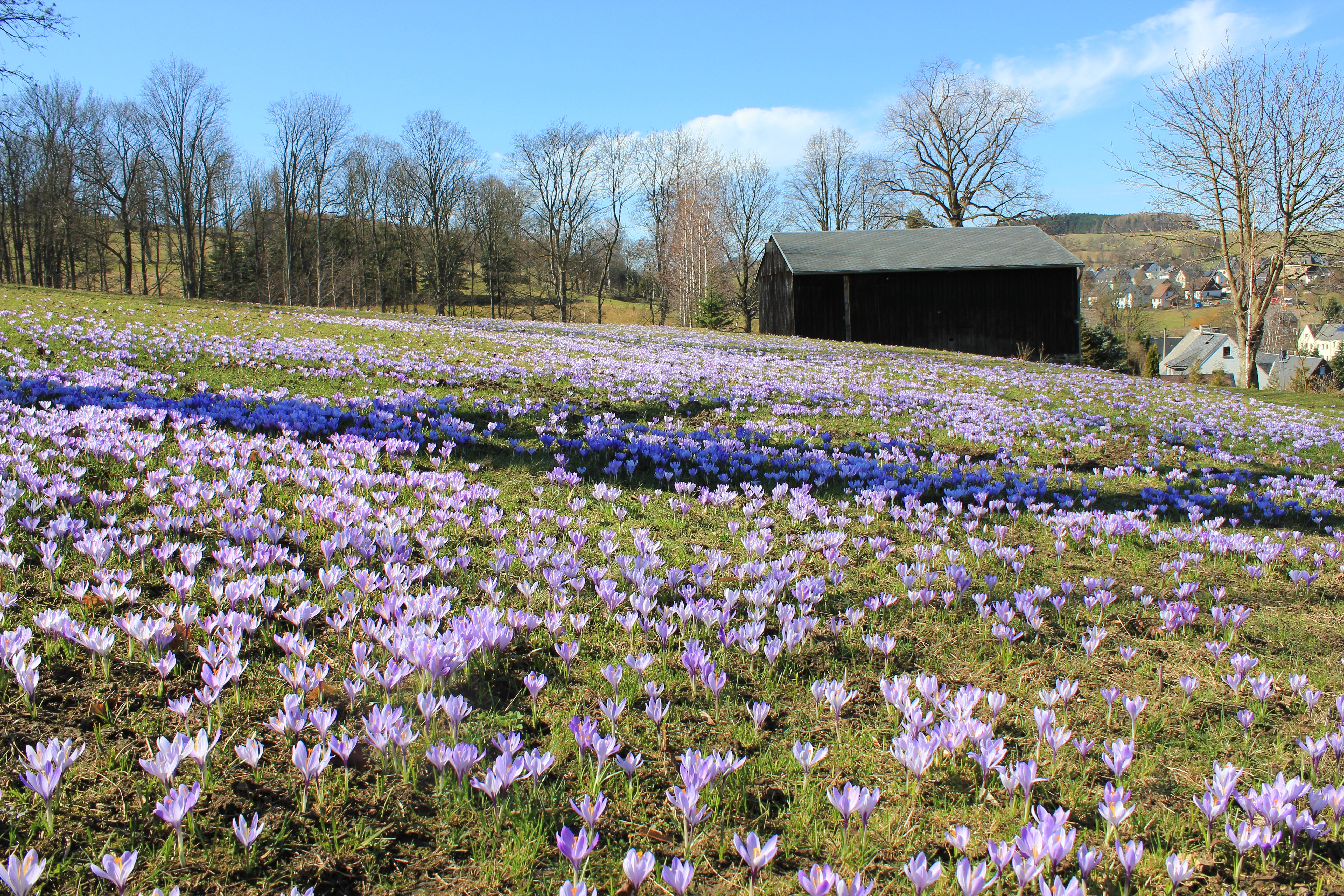 Flächen-Naturdenkmal Drebacher Krokuswiesen, 09430 Drebach, Erzgebirgskreis, Sachsen. – Jedes Jahr zwischen Anfang März bis Ende April können Sie in Drebach ein einzigartiges Naturerlebnis bewundern, die Krokusblüte. Es gibt in Drebach über 40 Flächennaturdenkmale mit insgesamt ca. 7 ha, auf denen die wild wachsenden violetten Drebacher Frühlingskrokusse, auch "Nackte Jungfern" genannt, angesiedelt sind.